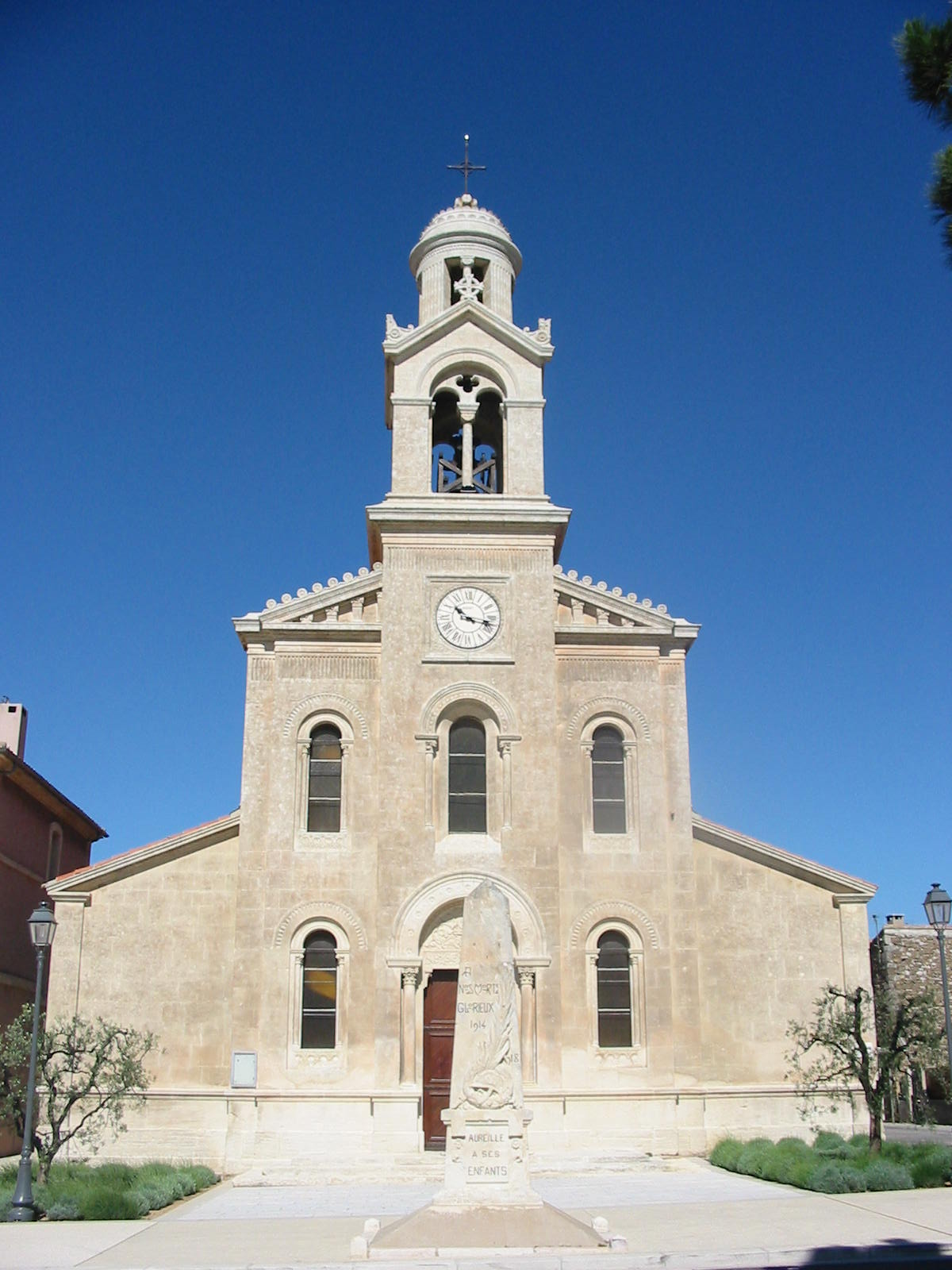 Église d'Aureille (Bouches-du-Rhône, Provence, France)